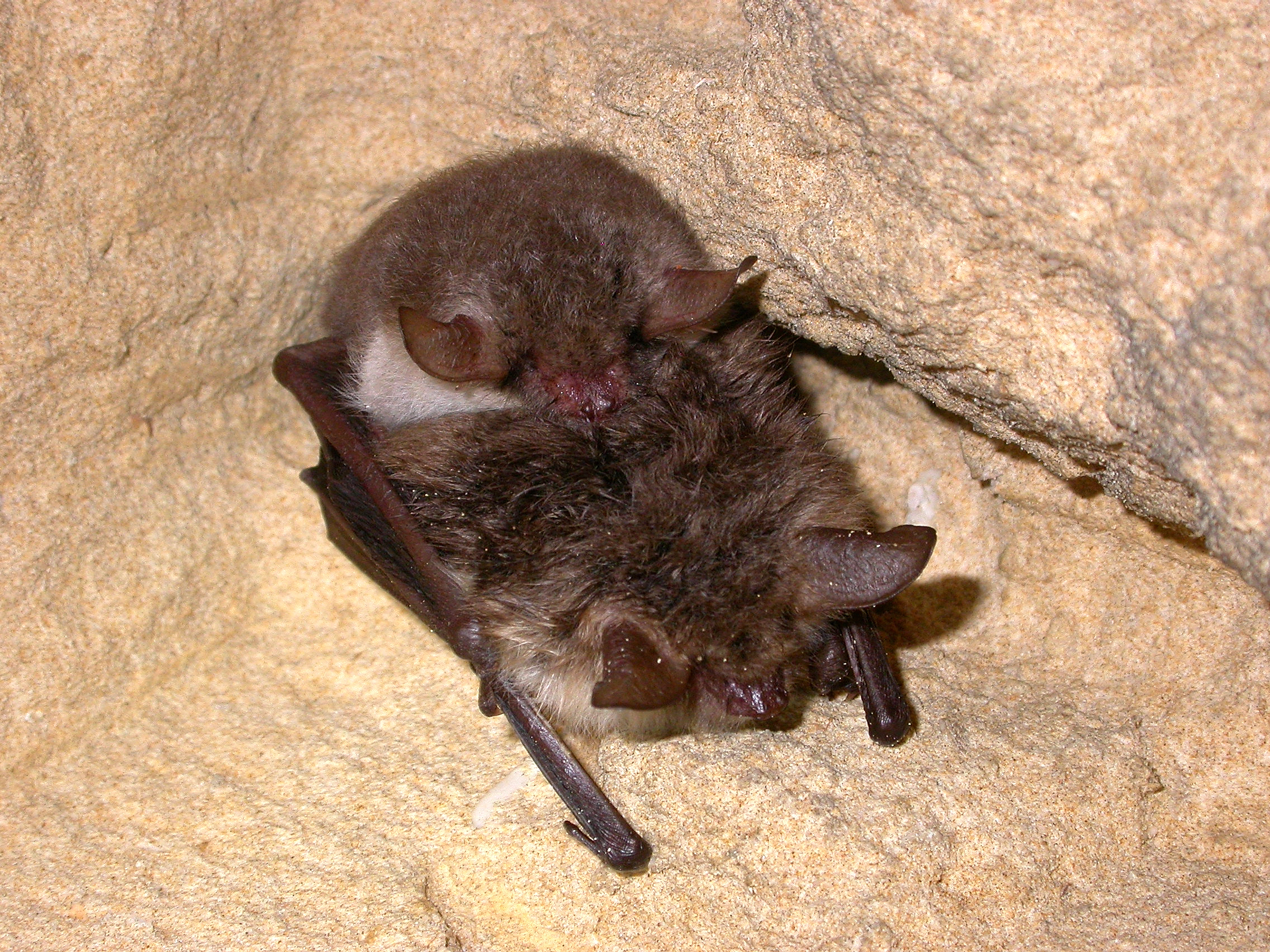 Myotis nattereri copulation